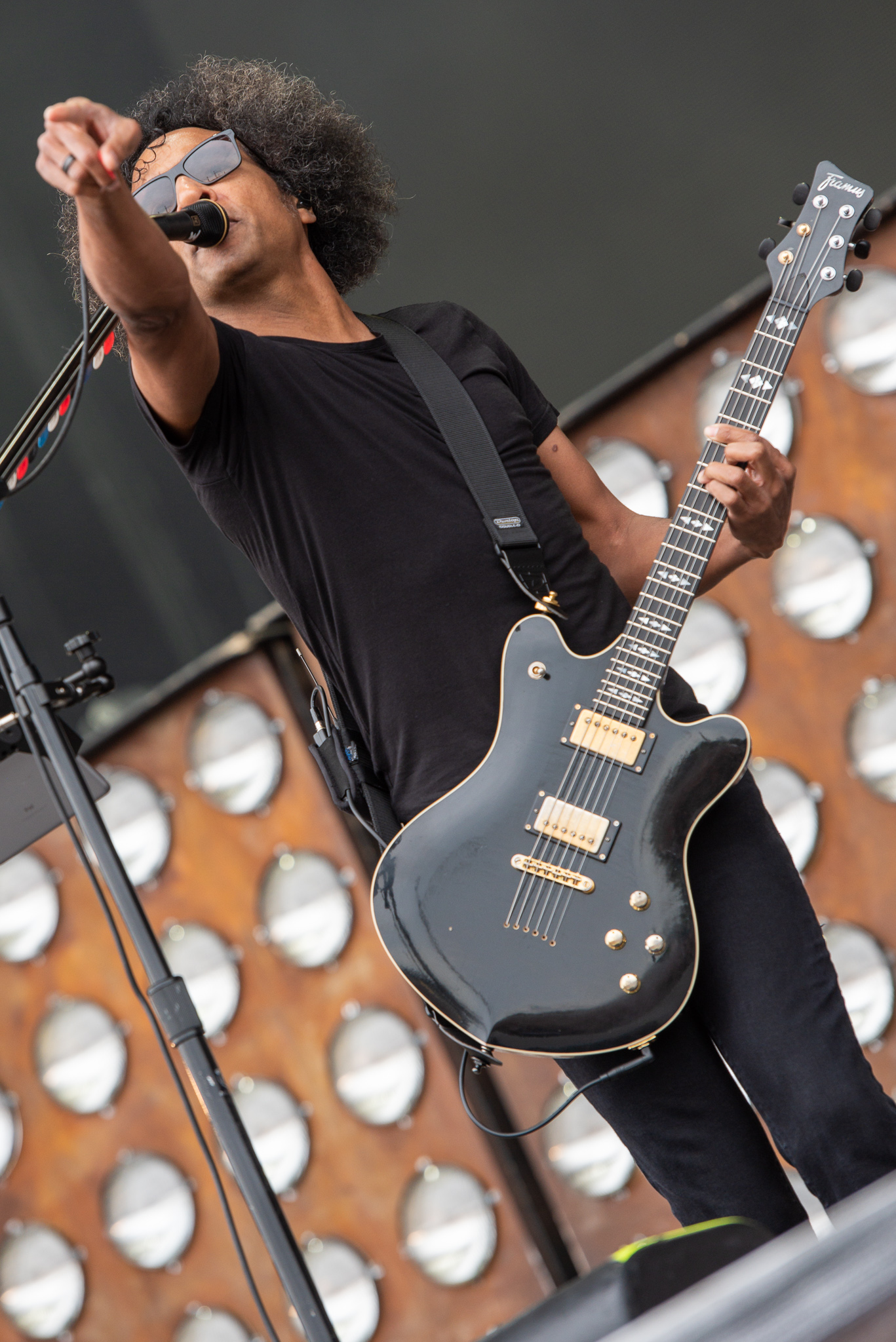 ARGO-Konzerte,Alice in Chains,Konzert,Livekonzert,Livemusik,Musik,RiP,Rock im Park 2019,William DuVall,Zeppelin Stage